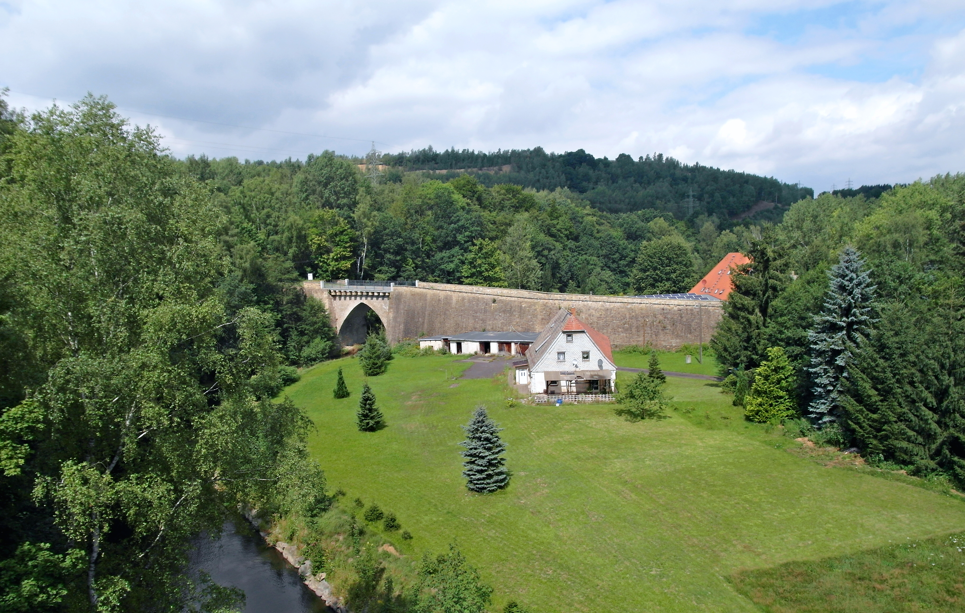 06.08.2017 09599 Halsbach/Neuhilbersdorf (Freiberg), Unteres Muldental (GMP: 50.918841,13.373359): Hammerbrücke (früher auch „Dresdner Brücke“), 1570 erbaut, älteste Brücke von Freiberg und eine der ältesten in Sachsen. Spitzbogenbrücke aus Naturstein, 7,20 m breit, Bogenspannweite 13,80 m, lichte Höhe 11,30 m. 1999 grundhaft saniert. Heute nur für Fußgänger. [SAM1283.JPG]20170806400DR.JPG(c)Blobelt